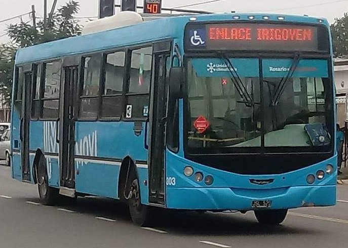 Mercedes-Benz OH 1618 de la empresa Movi